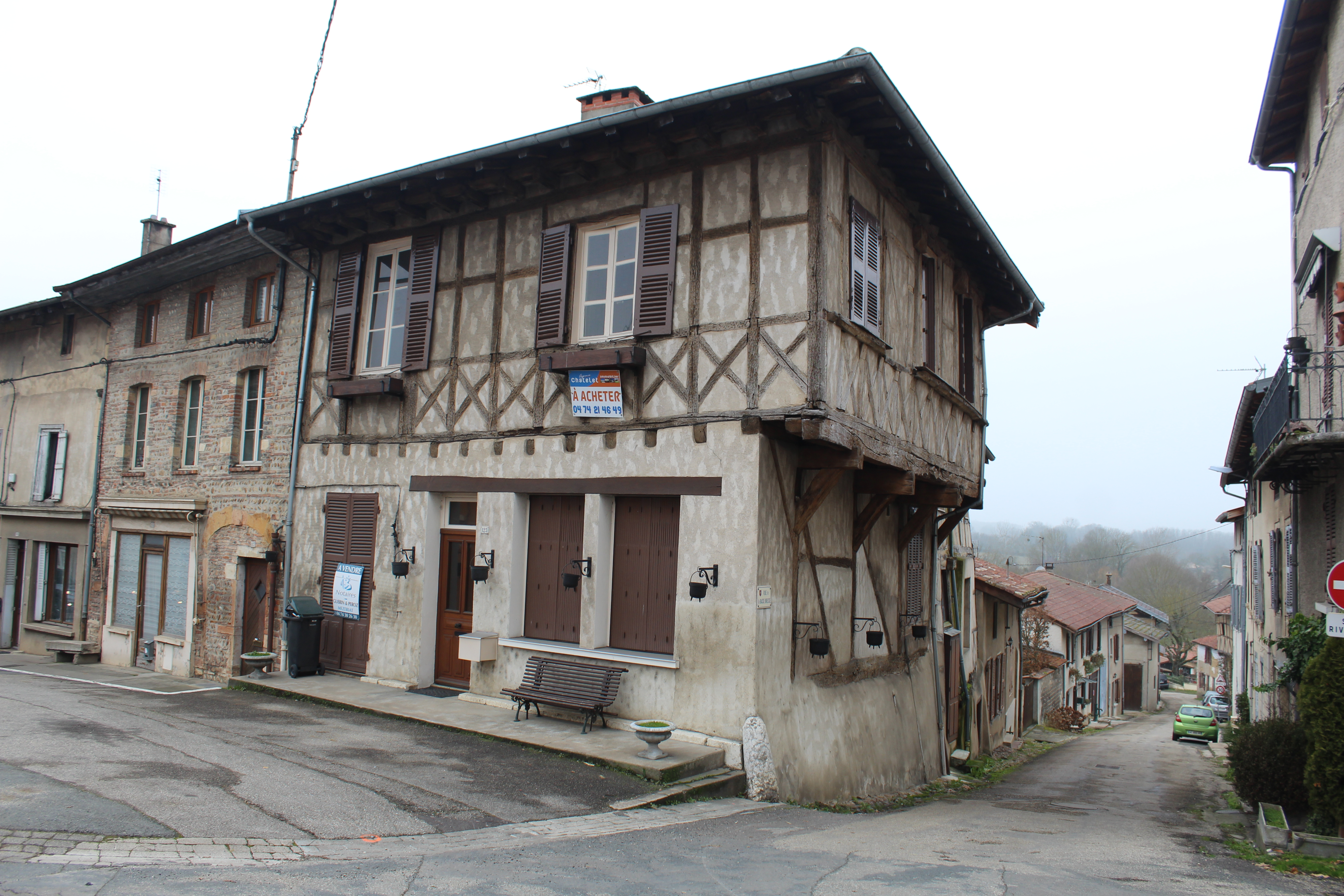 Maison à encorbellement au 123 Grande rue à Neuville-les-Dames.